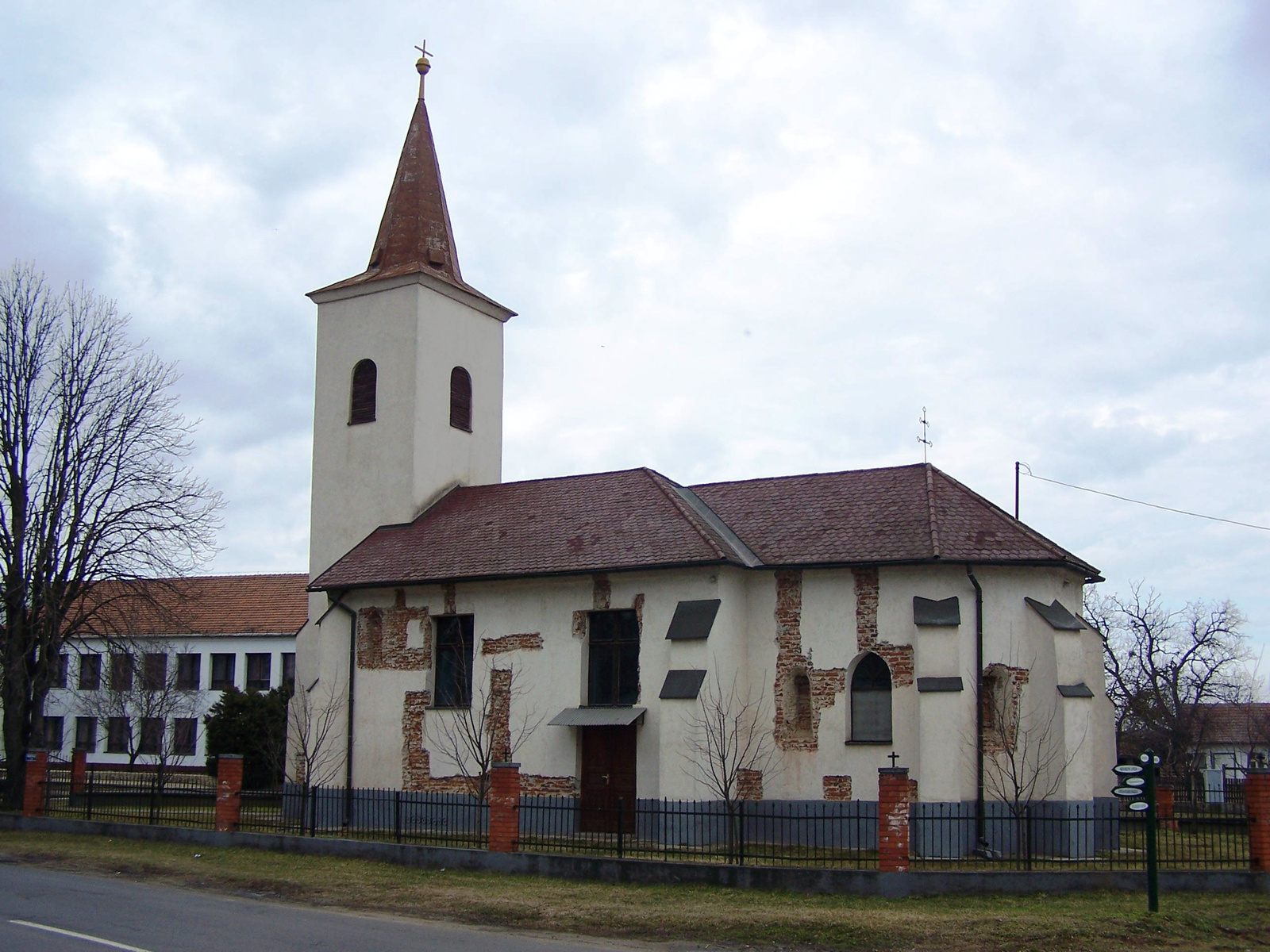 Római katolikus templom (Máriapócs, Kossuth tér) This is a photo of a monument in Hungary. Identifier: 8298